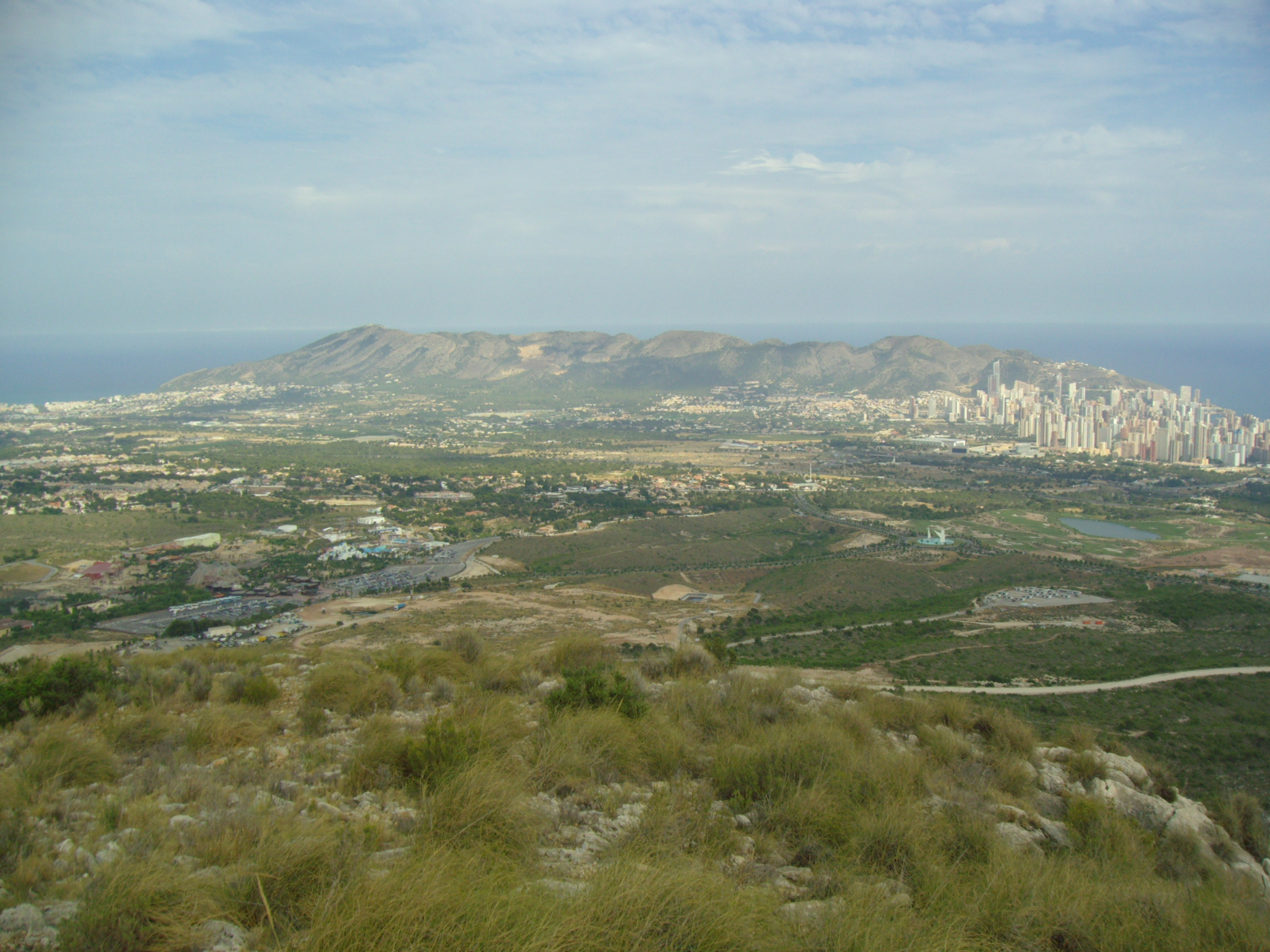 Sierra Helada vista desde la Sierra Cortina. A la derecha la localidad de Benidorm.